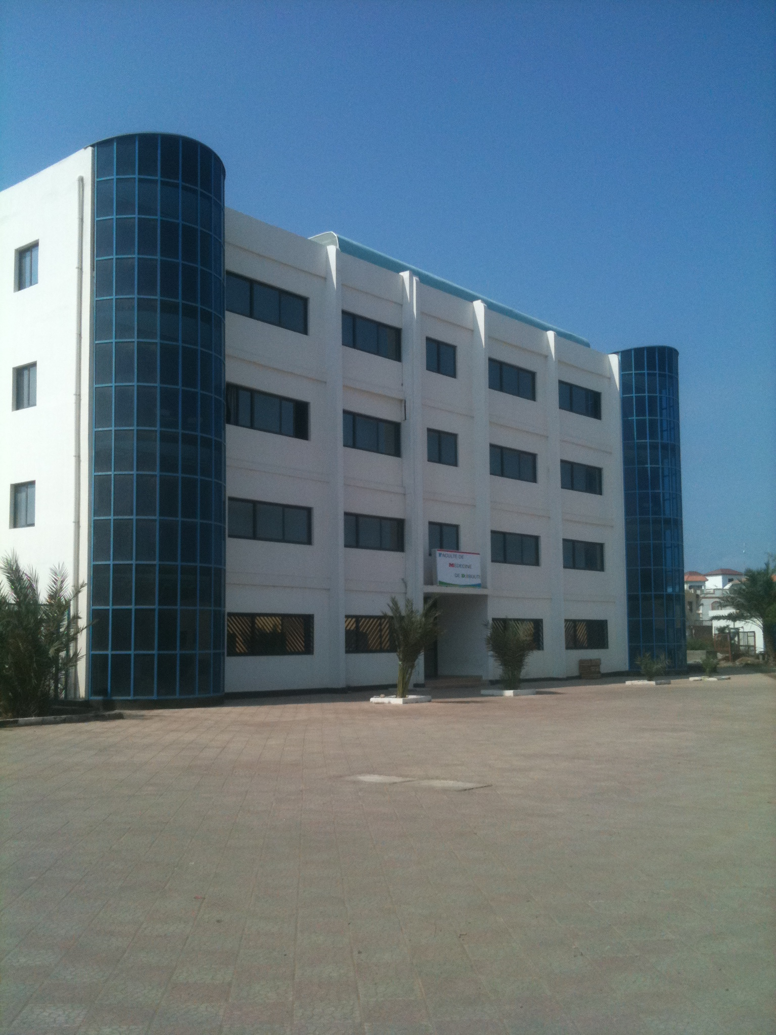 Faculte de Medicine. Batiment Principale. Djibouti